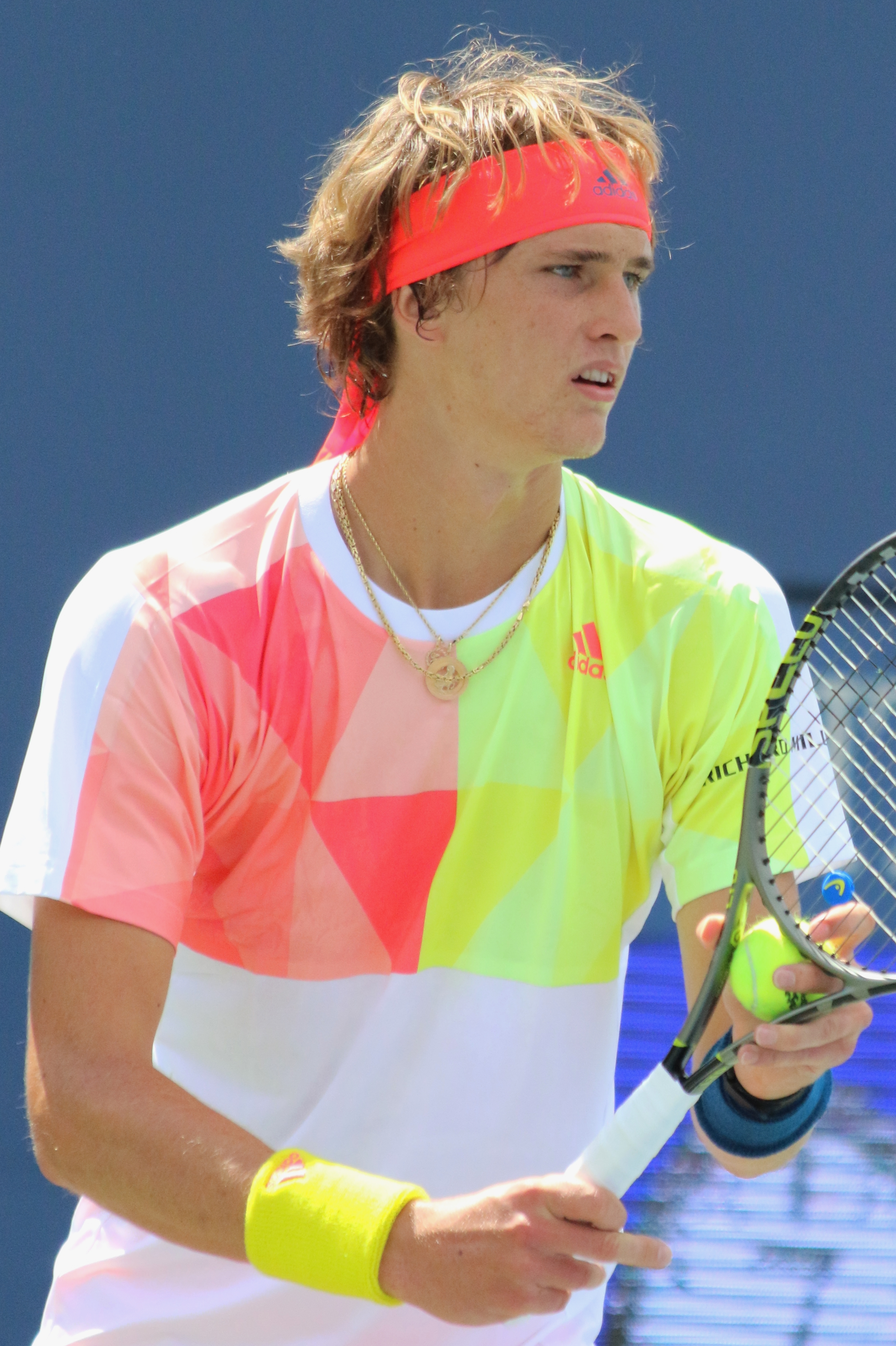 Zverev A. US16 (26)